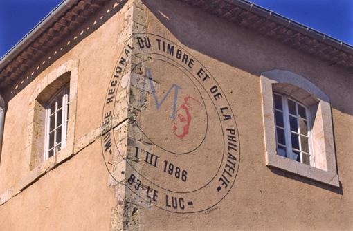 façade Musée du timbre